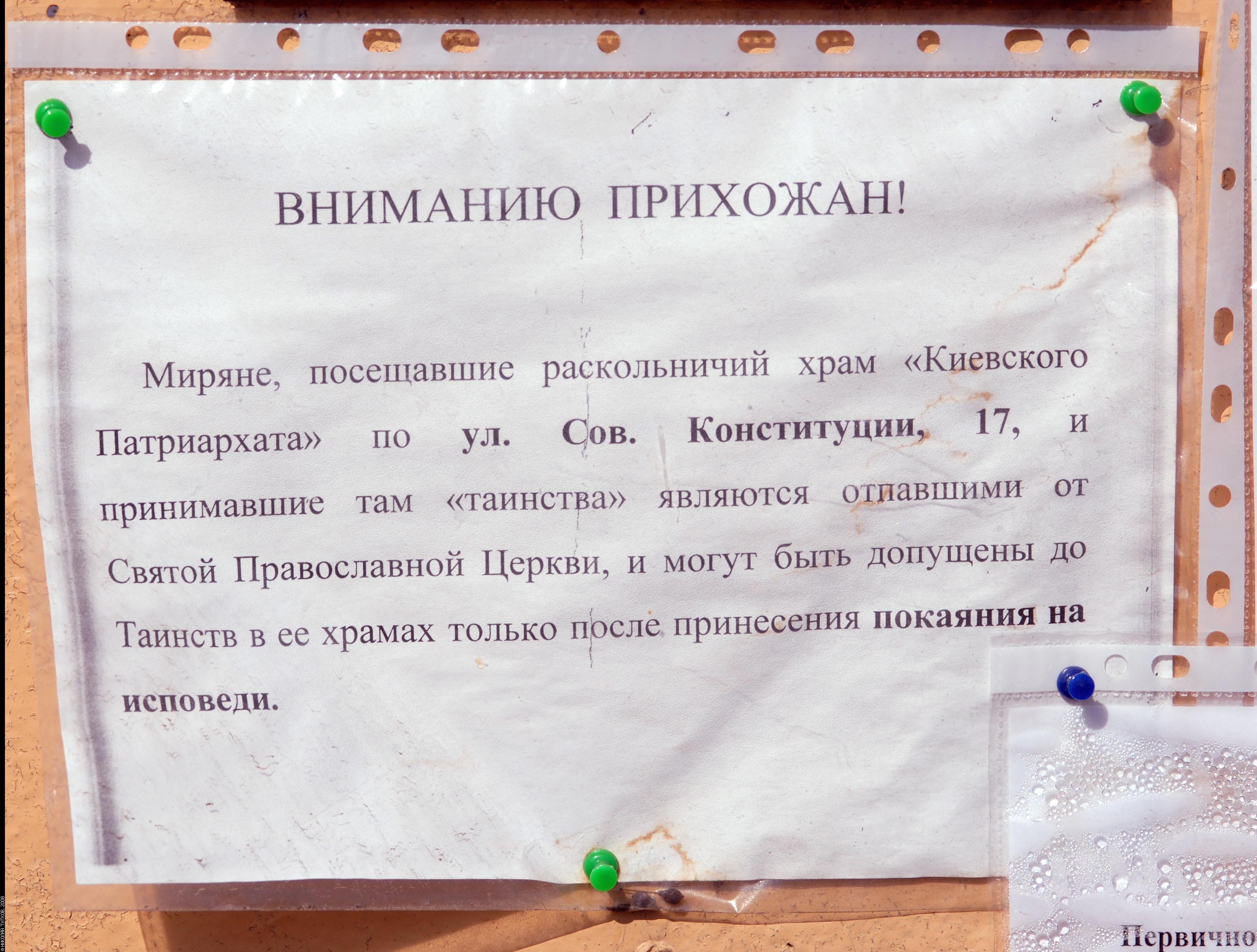 17/05/2008 Объявление при входе в Церковь Рождества Христова в Ямкине, Ногинского района Московской области